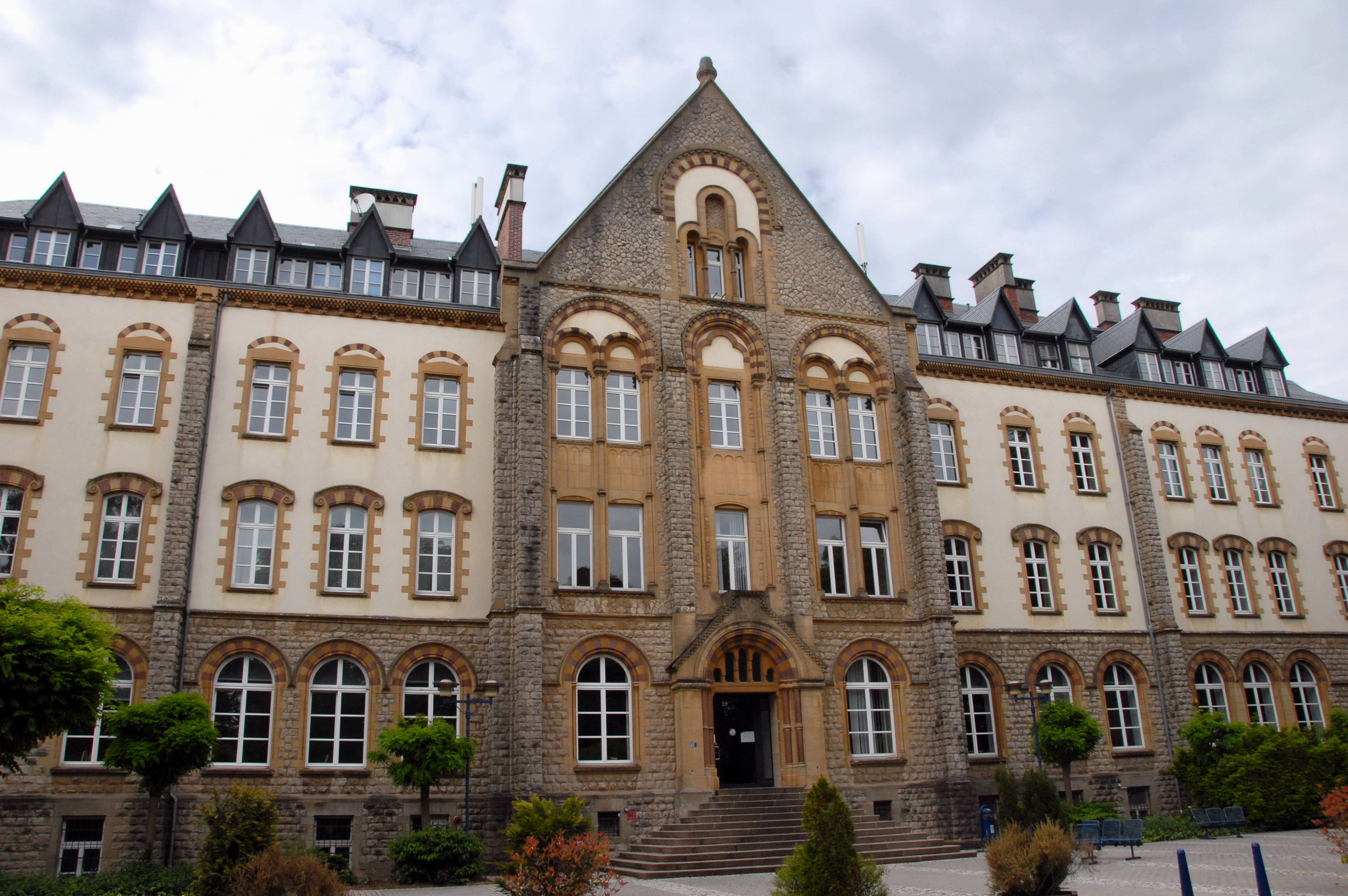 Haaptgebai, Université du Luxembourg, Lampertsbierg, Stad Lëtzebuerg. Kategorie:Schoulen zu Lëtzebuerg